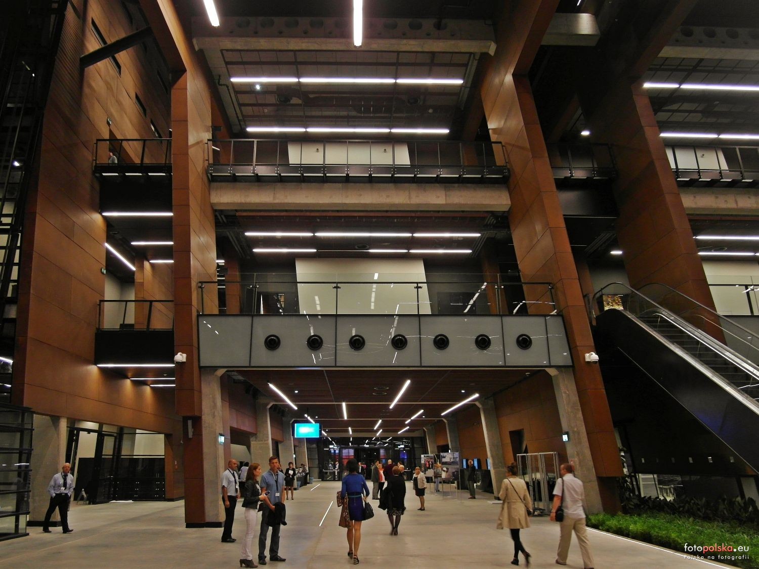 Europejskie Centrum Solidarności w Gdańsku. Hall prowadzący z ogrodu zimowego, w kierunku głównego wejścia.